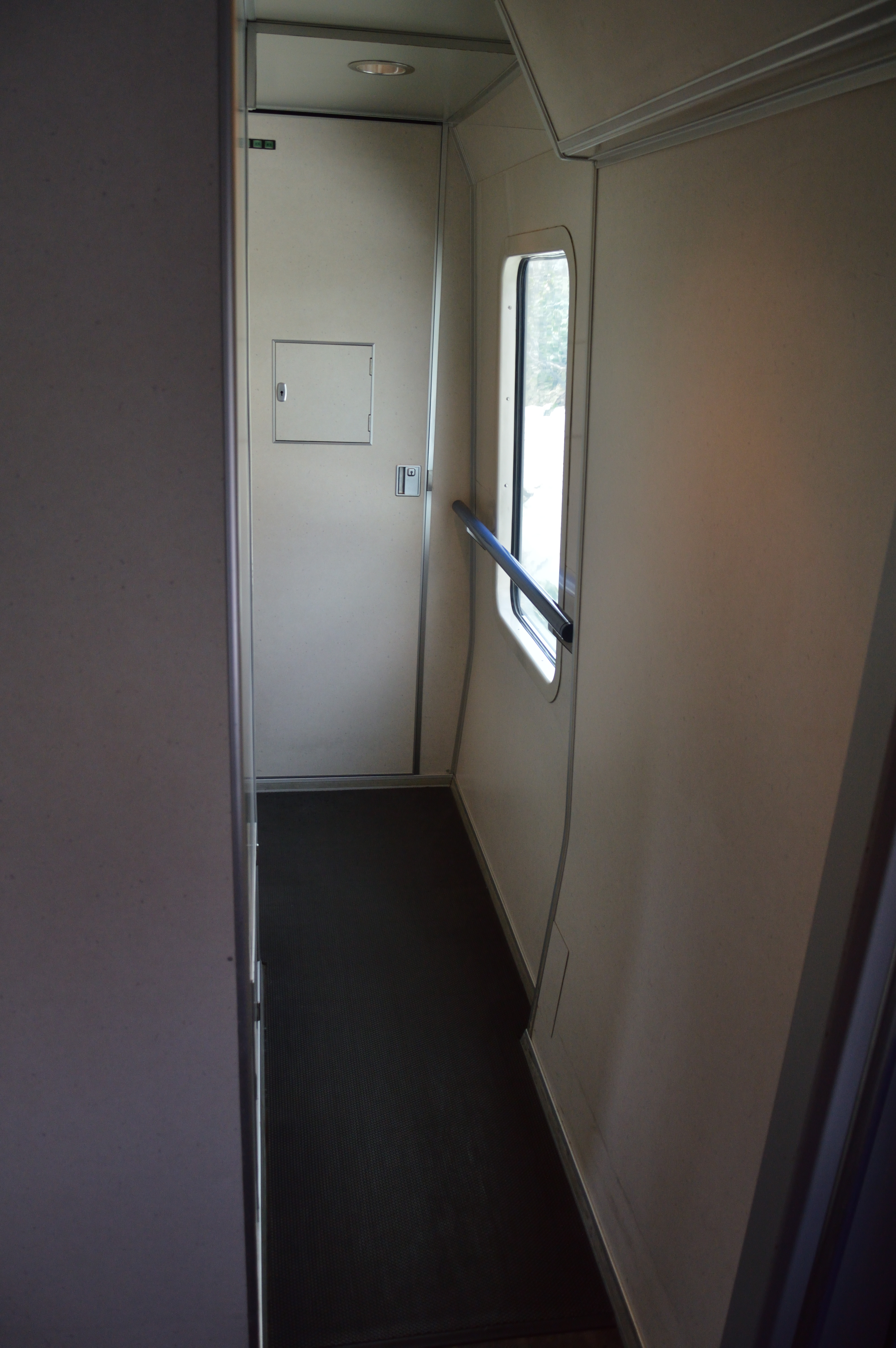 キハ260-104デッキ（便所横）の通路。 手すりが設けられフリースペース様となっている。 当初は喫煙コーナーが設けられていた。